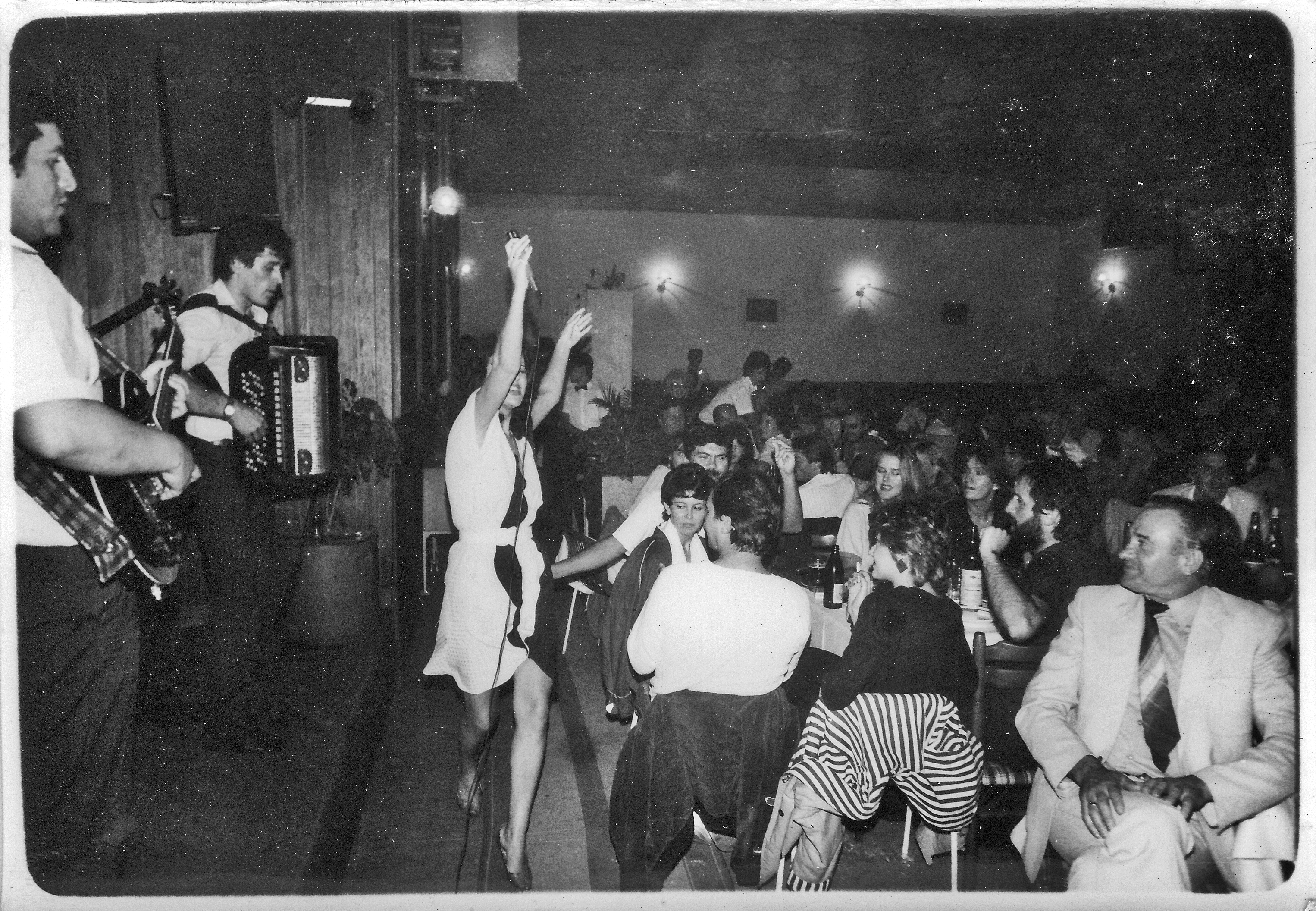 Snežana Savić na Filmskim susretima u Nišu 1984. godine